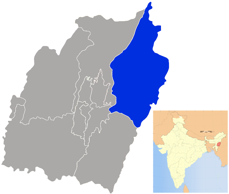 Ukhrul district in Manipur